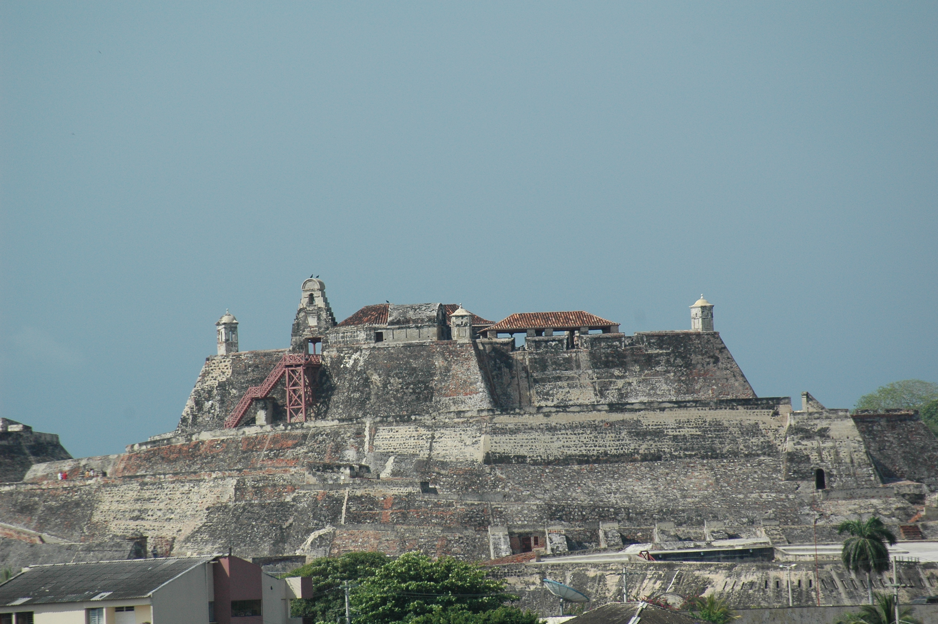 Cartagena de Indias Castello di San Felipe de Barajas